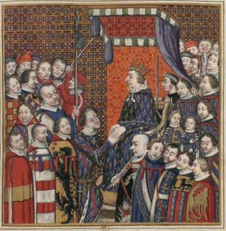 Copie de du manuscrit des Hommages de la comté de Clermont, autrefois à la Chambre des comptes pour Gaignières ; 1° Charles V, roi de France, mort en 1380 ; 2° Louis II, duc de Bourbon, mort en 1410 ; 3° Charles VI, roi de France (enfant) ; 4° Louis, duc d'Orléans, mort en 1407 (enfant) ; 5° Louis Ier, duc d'Anjou, roi de Sicile, mort en 1384 ; 6° Philippe de France, duc de Bourgogne, mort en 1404 ; 7° Jean de France, duc de Berri, mort en 1416 ; 8° Jean d'Artois, comte d'Eu, mort en 1387 ; 9° Guillaume de Dormans, chancelier de France, mort en 1380 ; 10° Bertrand du Guesclin, connétable, mort en 1380, 11° Louis de Sancerre, maréchal de France, mort en 1402 ; 12° Mouton de Blainville, maréchal, mort en 1391 ; 13° Hugues de Châtillon-Damplerre, grand maître des arbalétriers, mort au XIVe siècle ; 14° Jean de Vienne, amiral, mort en 1396 ; 15° Édouard de Beaujeu, seigneur du Perreux, mort en 1400 ; 16° N. de Chaumont, mort au XIVe siècle ; 17° Gilles de Nédonchel, chambellan du duc de Bourbon, mort au XIV° siècle ; 18° Renaud de Trie, seigneur du Plessis, mort au XIVe siècle ; 19° Jean, bâtard de Bourbon, mort en 1375 ; 20° Pierre d'Auxy, seigneur de Monceaux, après 1734 ; 21° N. de Norry, chevalier, XIVe siècle.